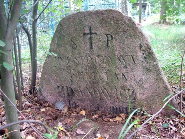 Grób z nazwiskiem Zdanowicz w osadzie Okolica (biał. Аколіца) w rejonie kliczewskim, Białoruś.